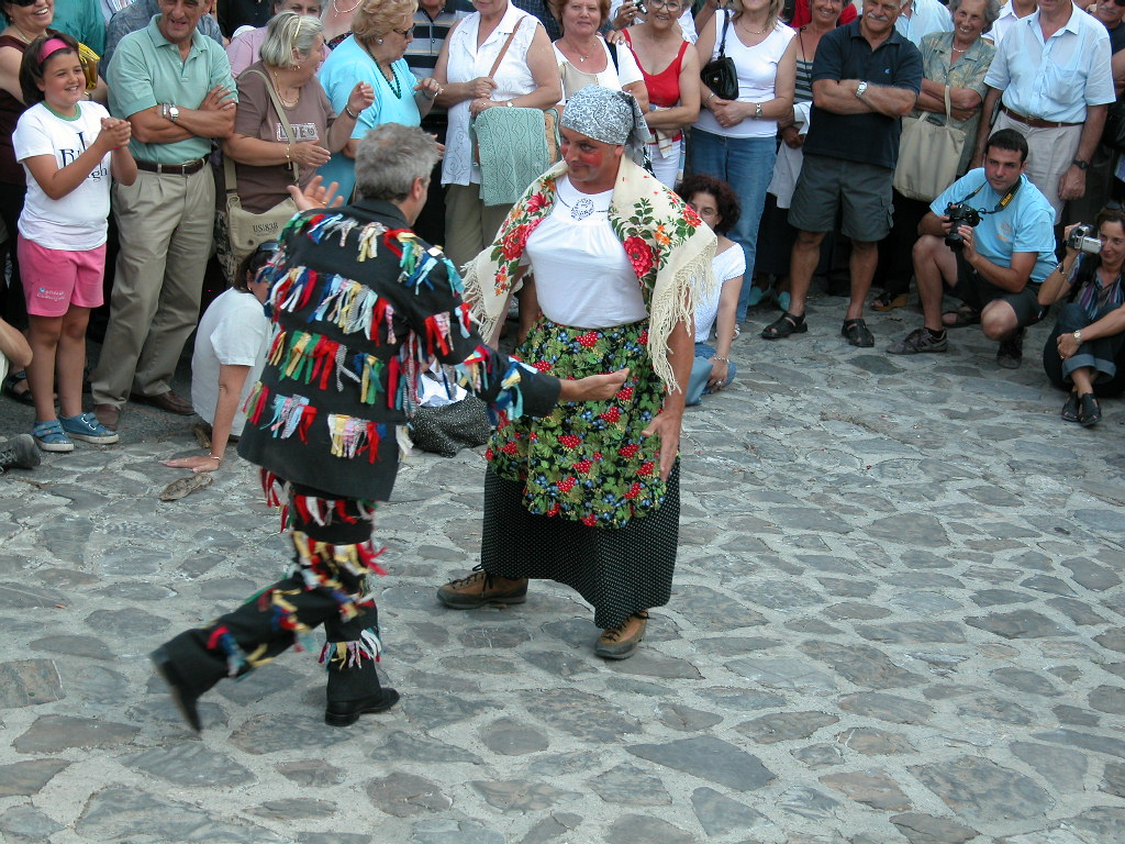 Foto mia personale, carnevale di Cegni, 16/08/2007 Licensing Categoria:Immagini delle quattro province Categoria:Immagini di danza